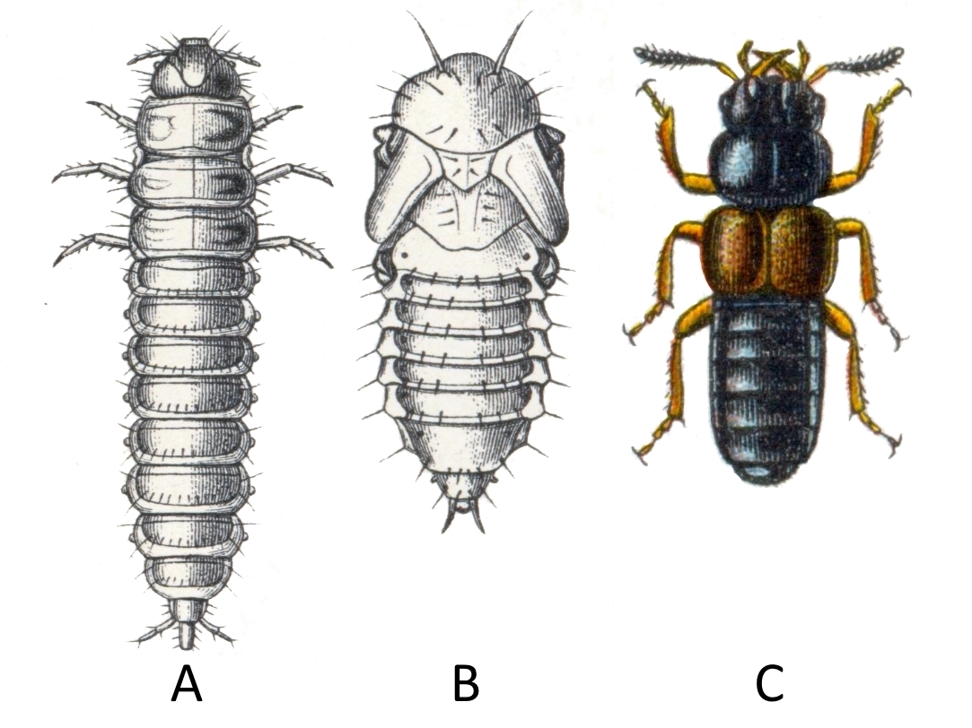 Platystethus arenarius Fauna Germanica. Die Käfer des Deutschen Reiches. I. & II. Band. Farbendrucktafeln von Dr. K.G. Lutz. K.G. Lutz' Verlag, Stuttgart 1908